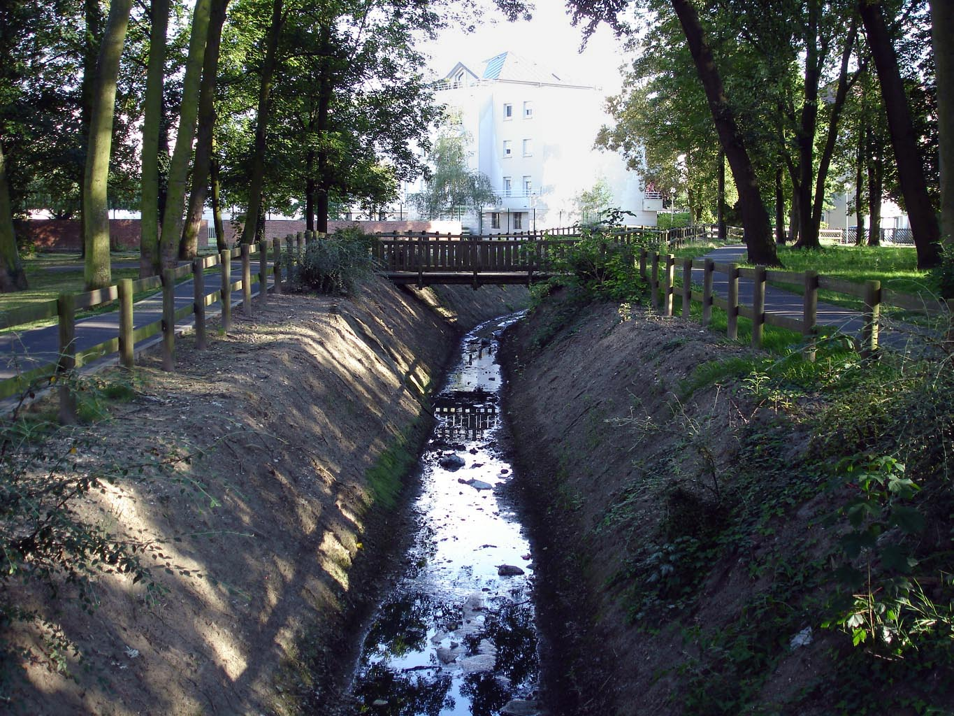 Le Petit-Rosne à Sarcelles (Val-d'Oise), France Vue prise à Sarcelles-village, dans le bois Leblanc Août 2007 Photo personnelle (own work) de Clicsouris